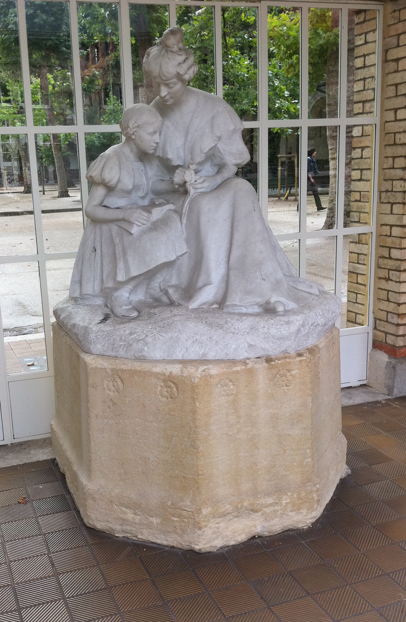 La Leçon de botanique, 1908, groupe en marbre réalisé pour le lycée par Blanche Moria (1859-1927), professeur d'arts plastiques du lycée au XIXe siècle.